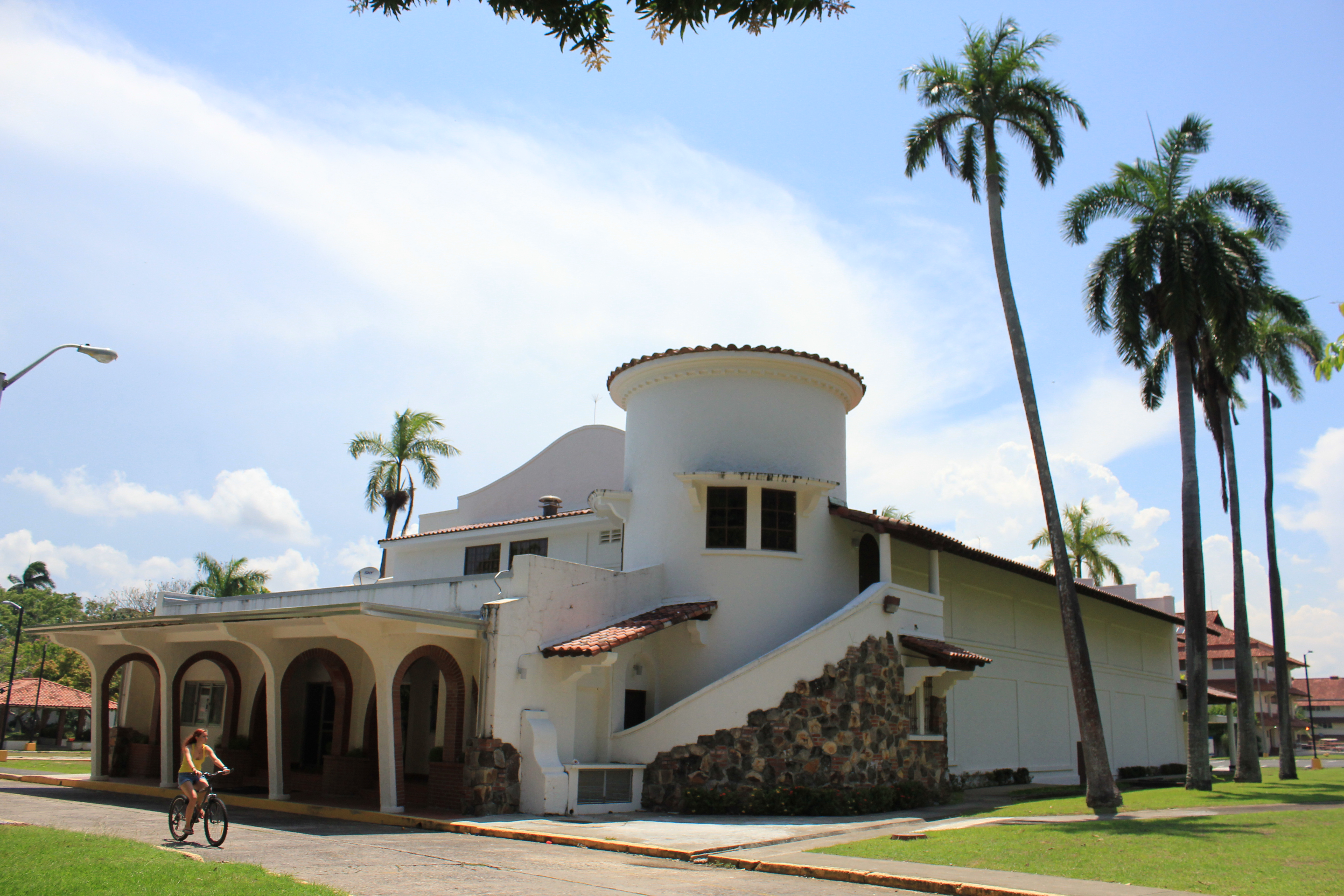 Ateneo de la Ciudad del Saber, Clayton, Panamá.